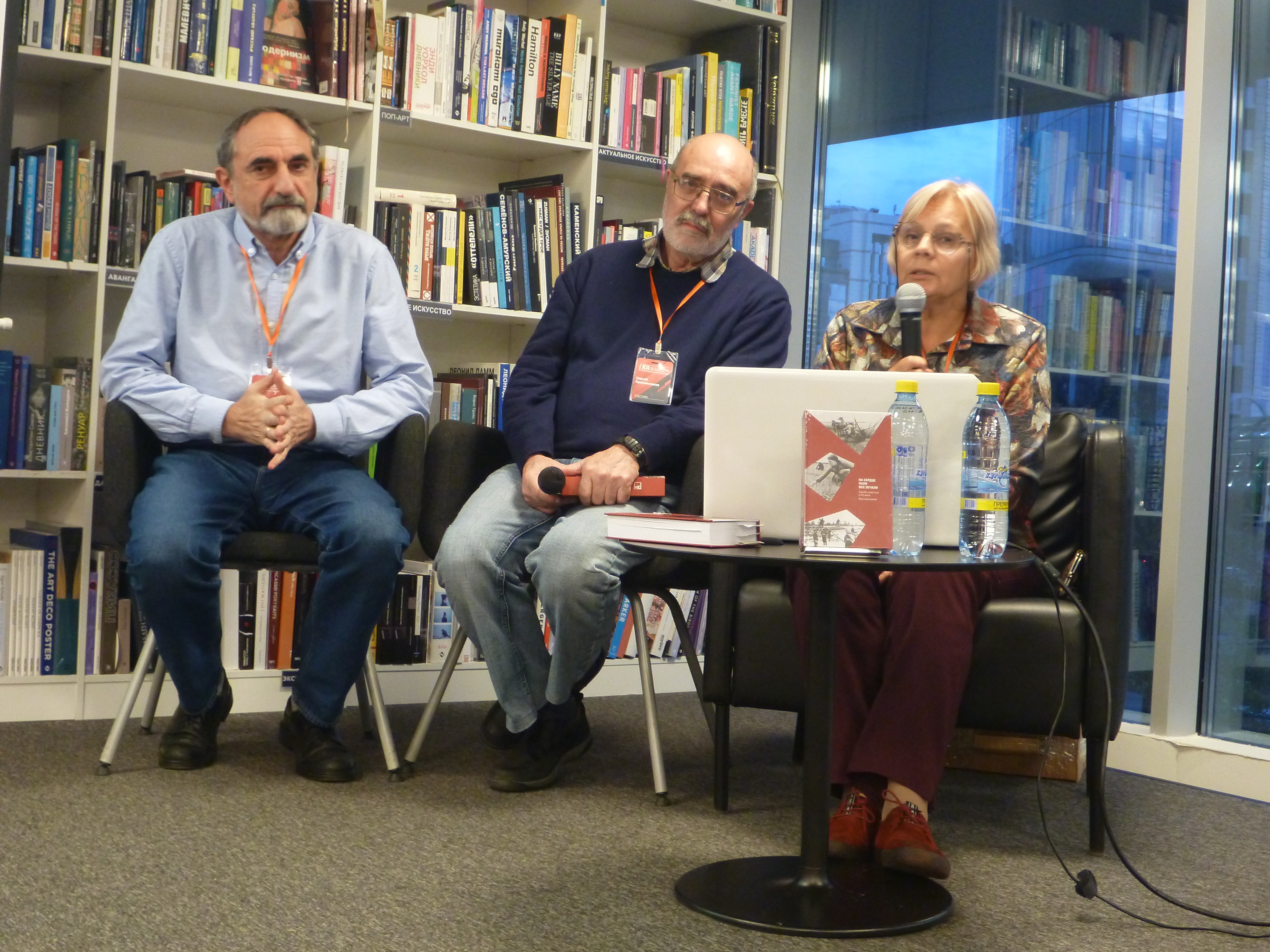 Алексей Степанов Сергей Красильников и Островская на презентации книги в Пиотровском 27 сентября 2019 года